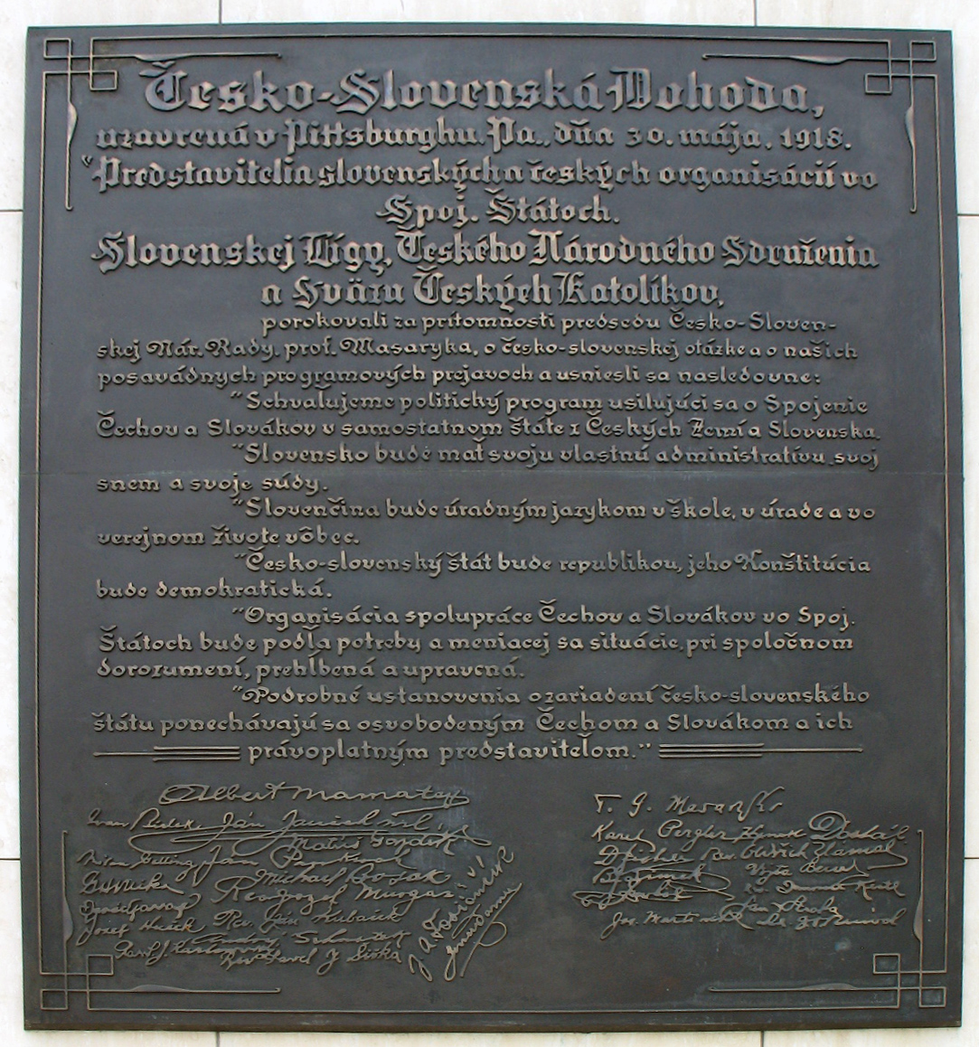 Tabuľa z Pamätníka generála Milana Rastislava Štefánika